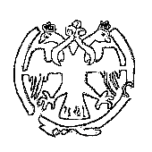 Герб княжества Готия